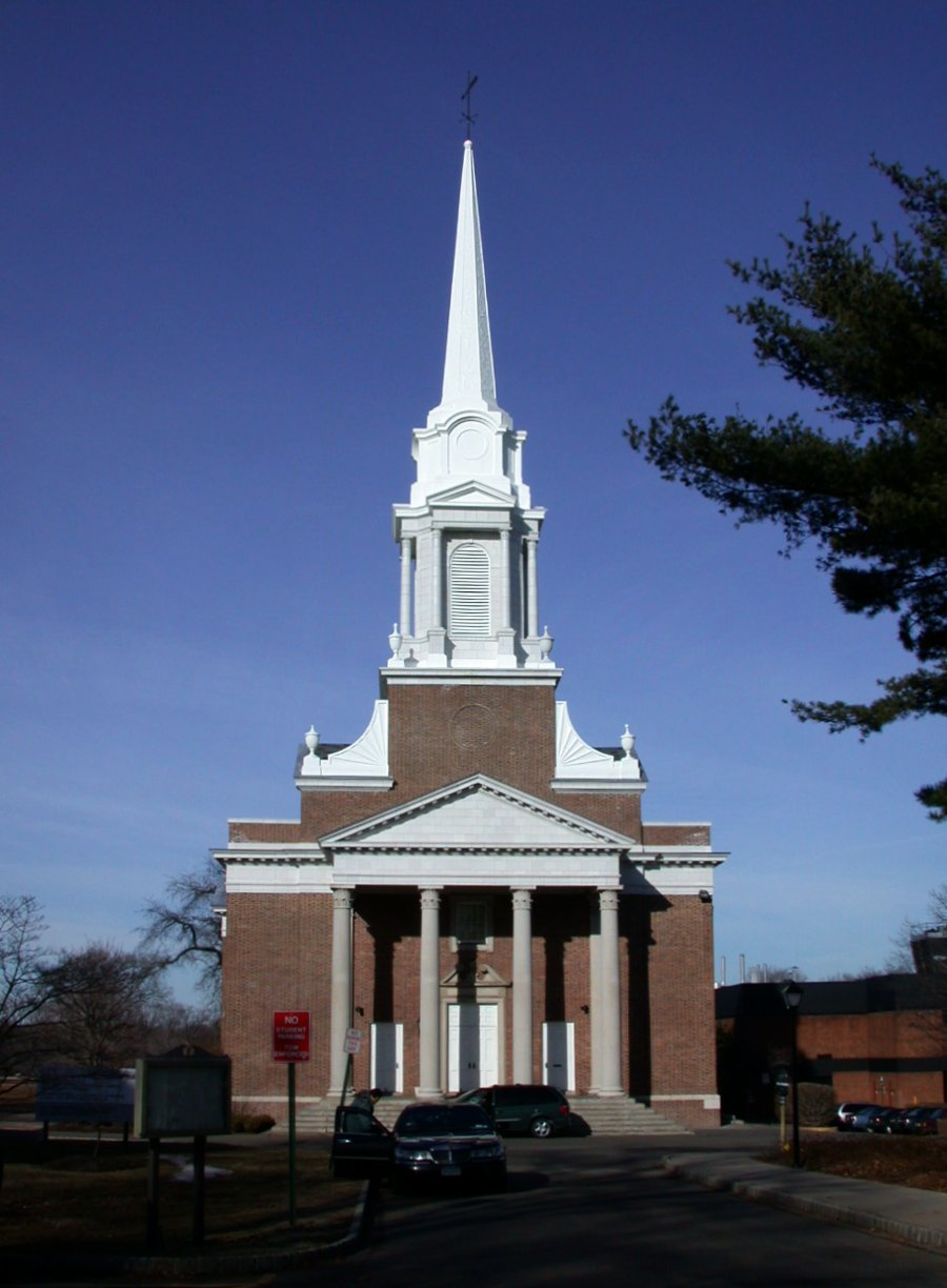 Voorhees Chapel, Douglass College, New Brunswick, NJ